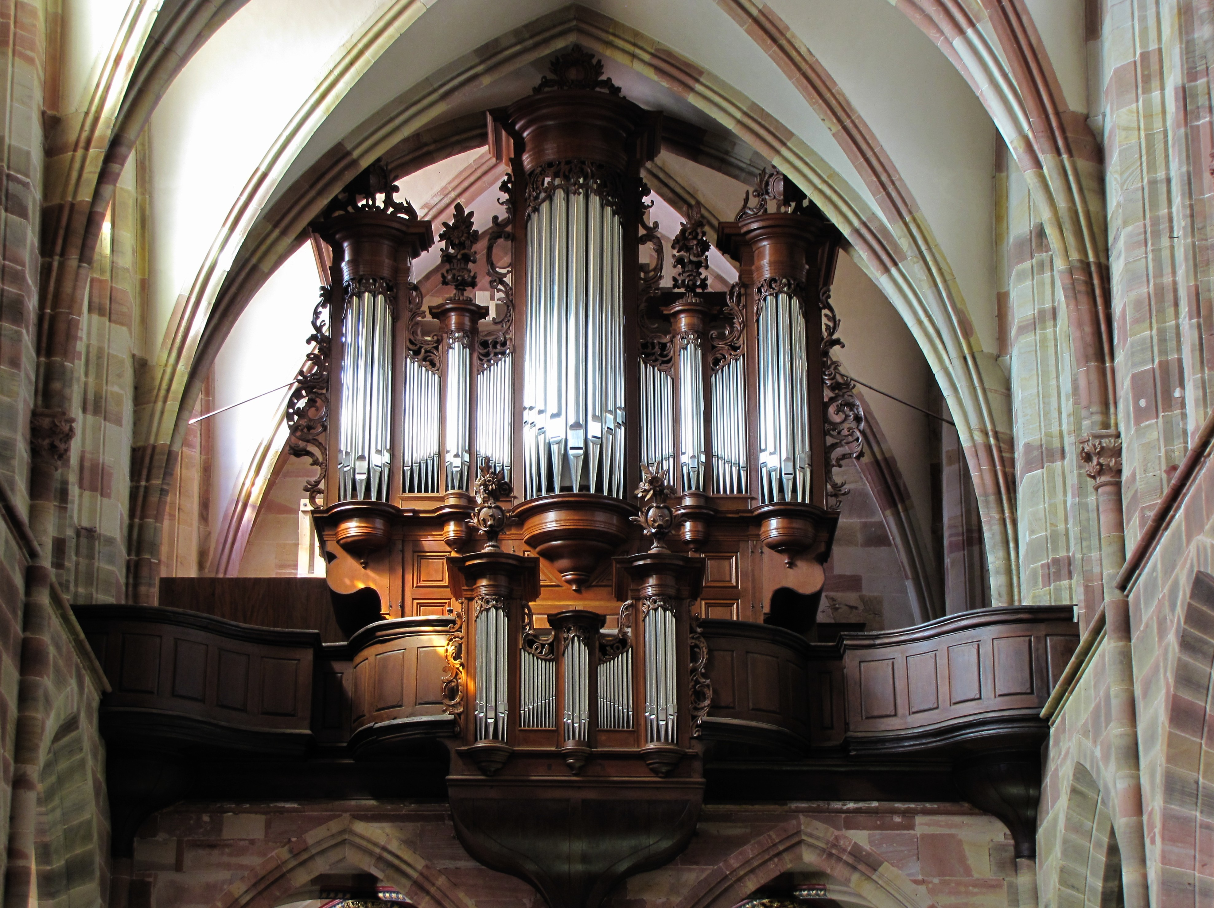 Alsace, Bas-Rhin, Wissembourg, Église abbatiale Saints-Pierre-et-Paul (PA00085247, IA67008036). Orgue Alffermann-Dubois (1765): This object is classé Monument Historique in the base Palissy, database of the French furniture patrimony of the French ministry of culture, under the references PM67001115 and IM67011577. This object is classé Monument Historique in the base Palissy, database of the French furniture patrimony of the French ministry of culture, under the references buffet PM67000460 buffet and instrument PM67000459 instrument.